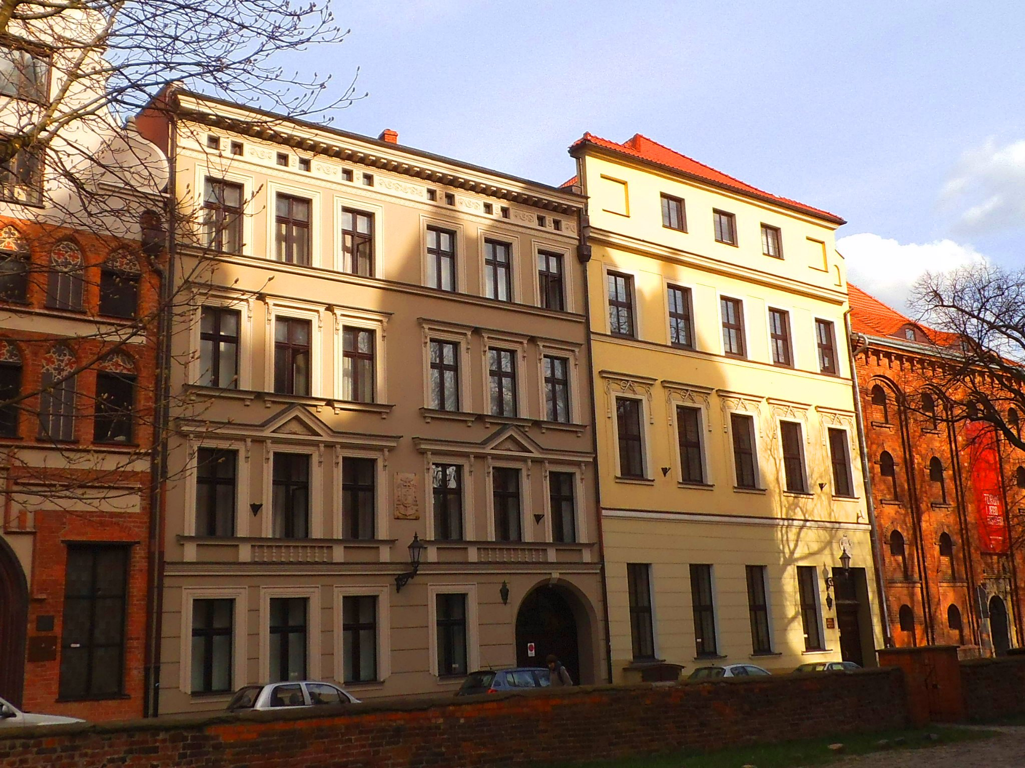 Kuria toruńska